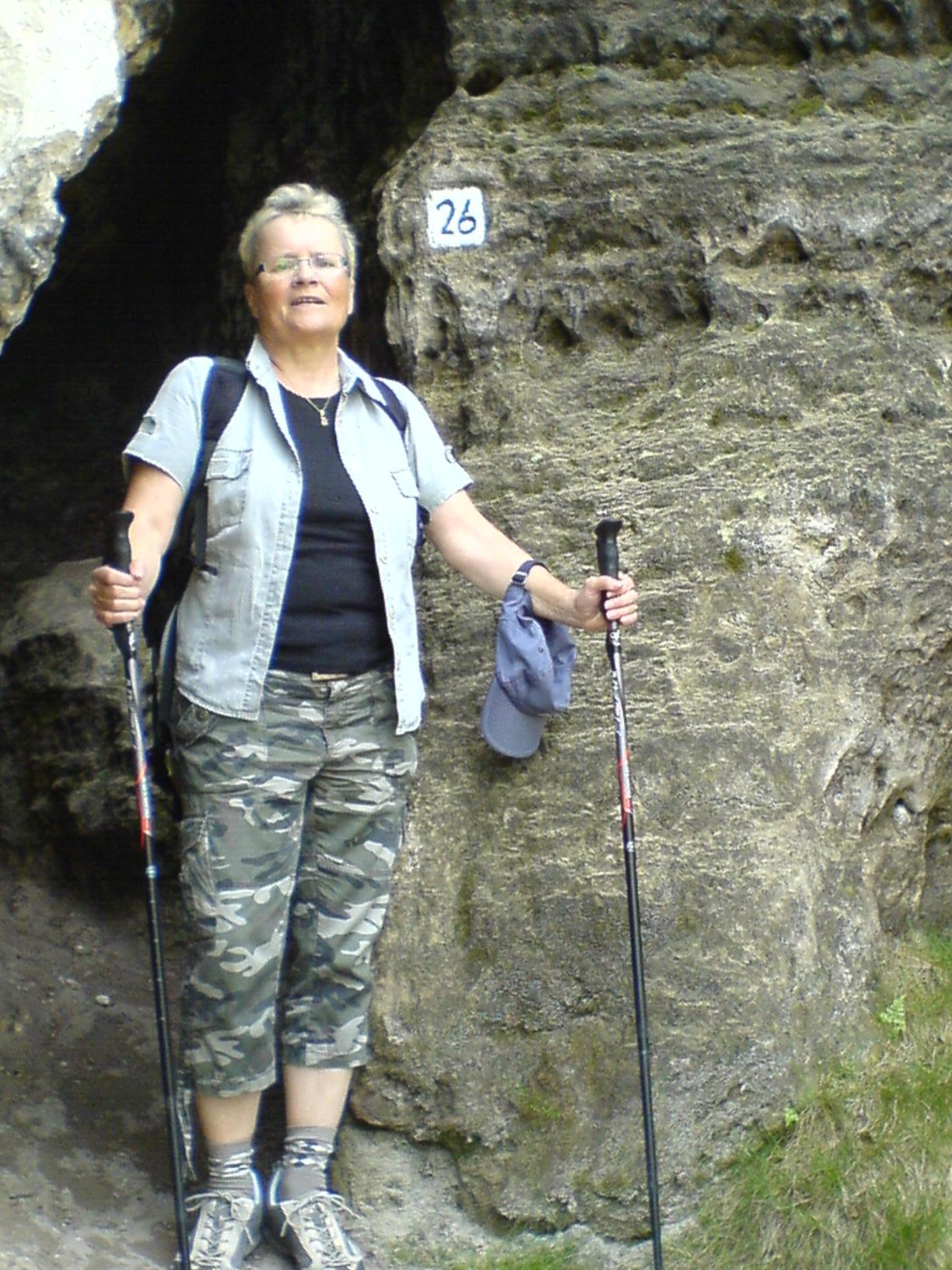 Svatava Antošová